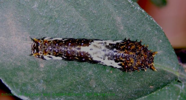 Papilio demoleus larva, India